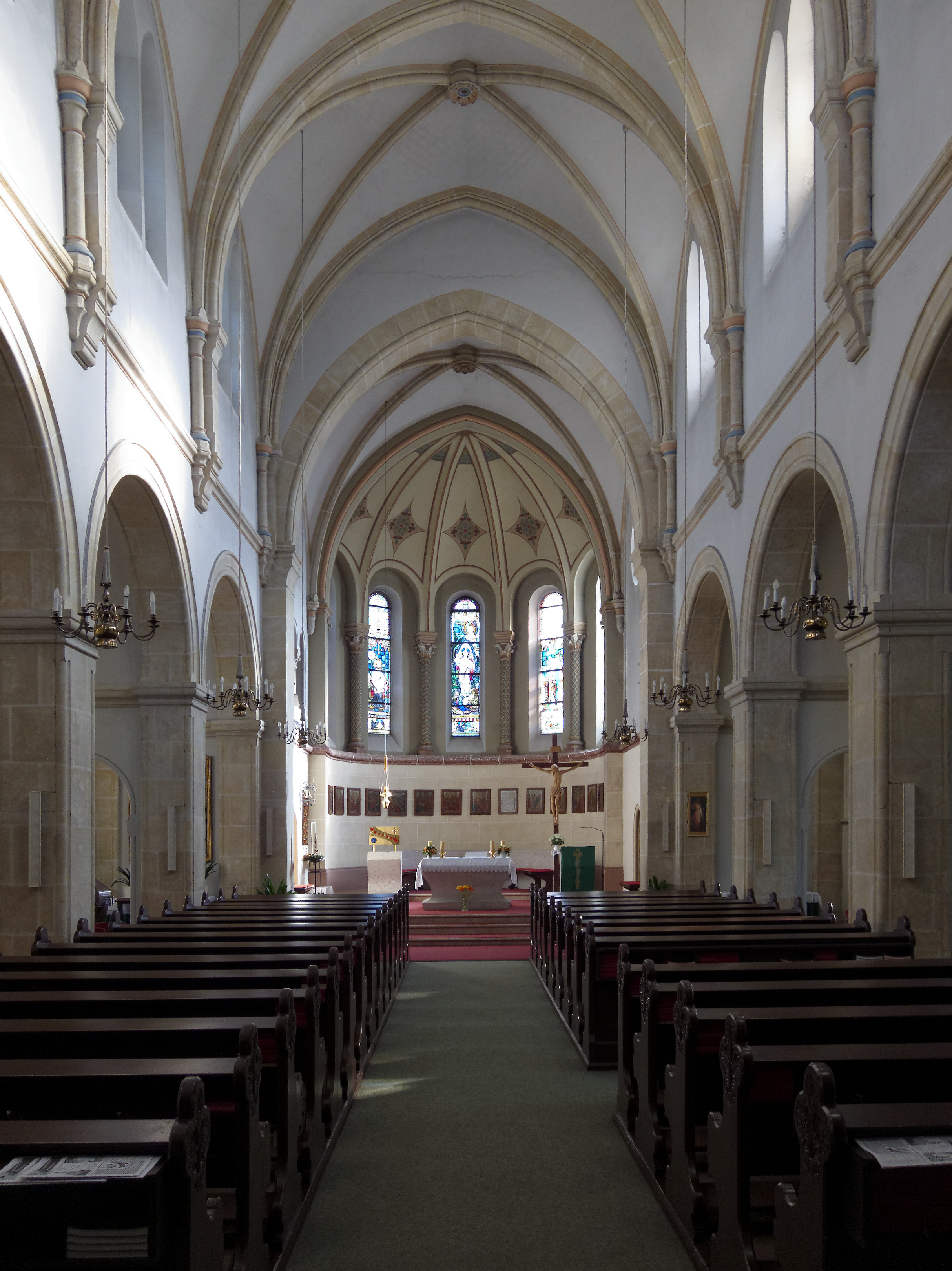 Gießhübl, Kath. Pfarrkirche Hl. Dreifaltigkeit, Innenansicht